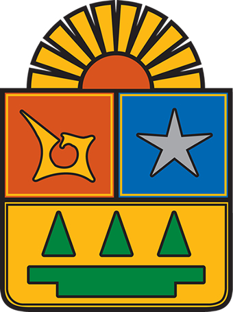 El sol representa al joven Estado que surge del pasado hacia el futuro radiante, no se bordea ya que significa un horizonte abierto al infinito para aspirar a las más elevadas metas de superación en camino siempre ascendente. Los DIEZ haces luminosos simbolizan cada uno de los municipios. La estrella simboliza un nuevo ideal orientado hacia metas superiores. Según la Cultura Maya, el color azul cobalto, muestra el mar de Quintana Roo. El glifo maya del caracol representa los orígenes étnicos de Quintana Roo. La riqueza forestal quintanarroense la representan los tres triángulos. El glifo maya del viento en forma de T, significa el fenómeno del huracán, característico de la región y también simboliza la tierra fértil de la Entidad. - See more at